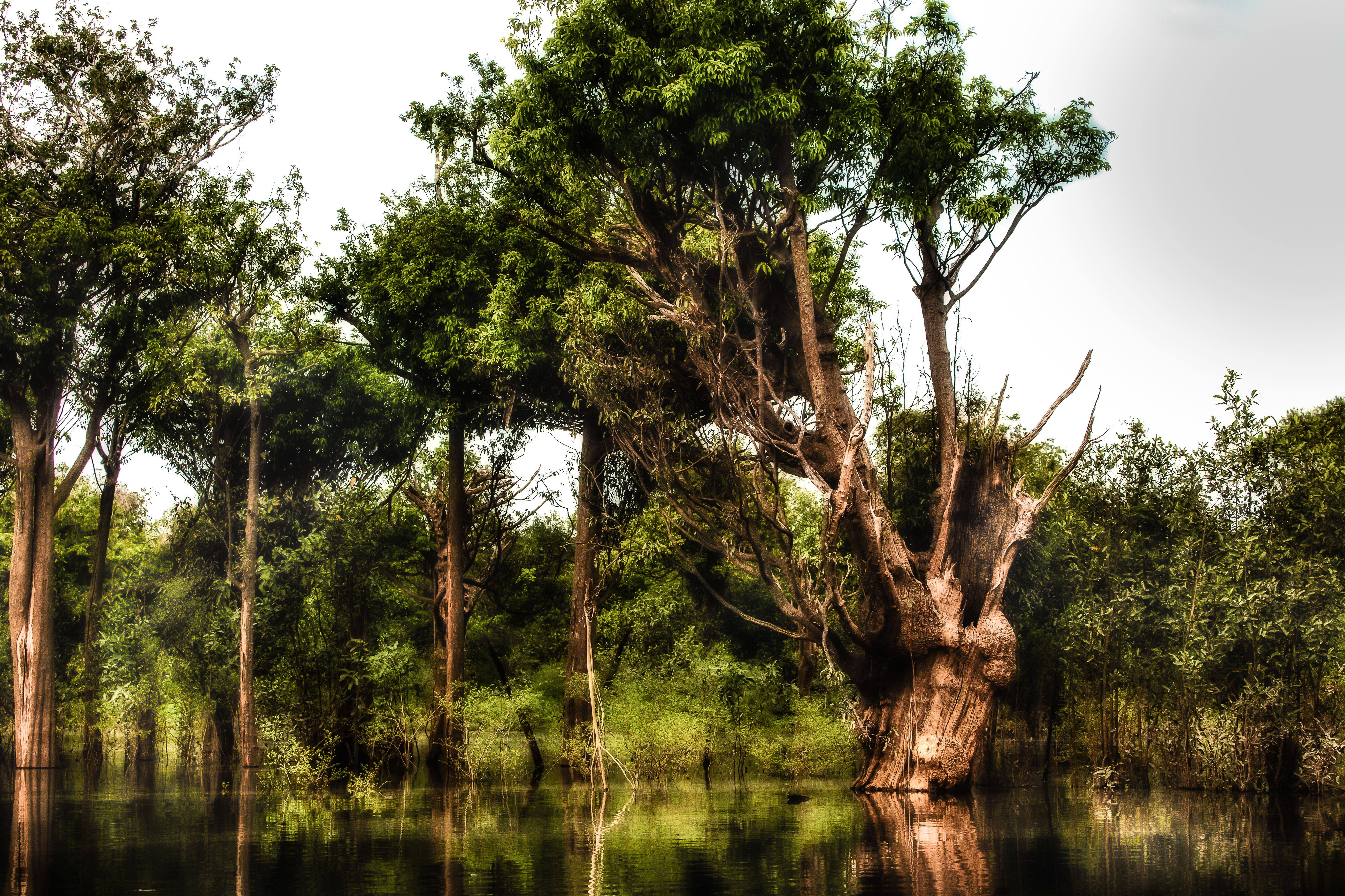 Parque Nacional Anavilhanas - Amazônia - Brasil